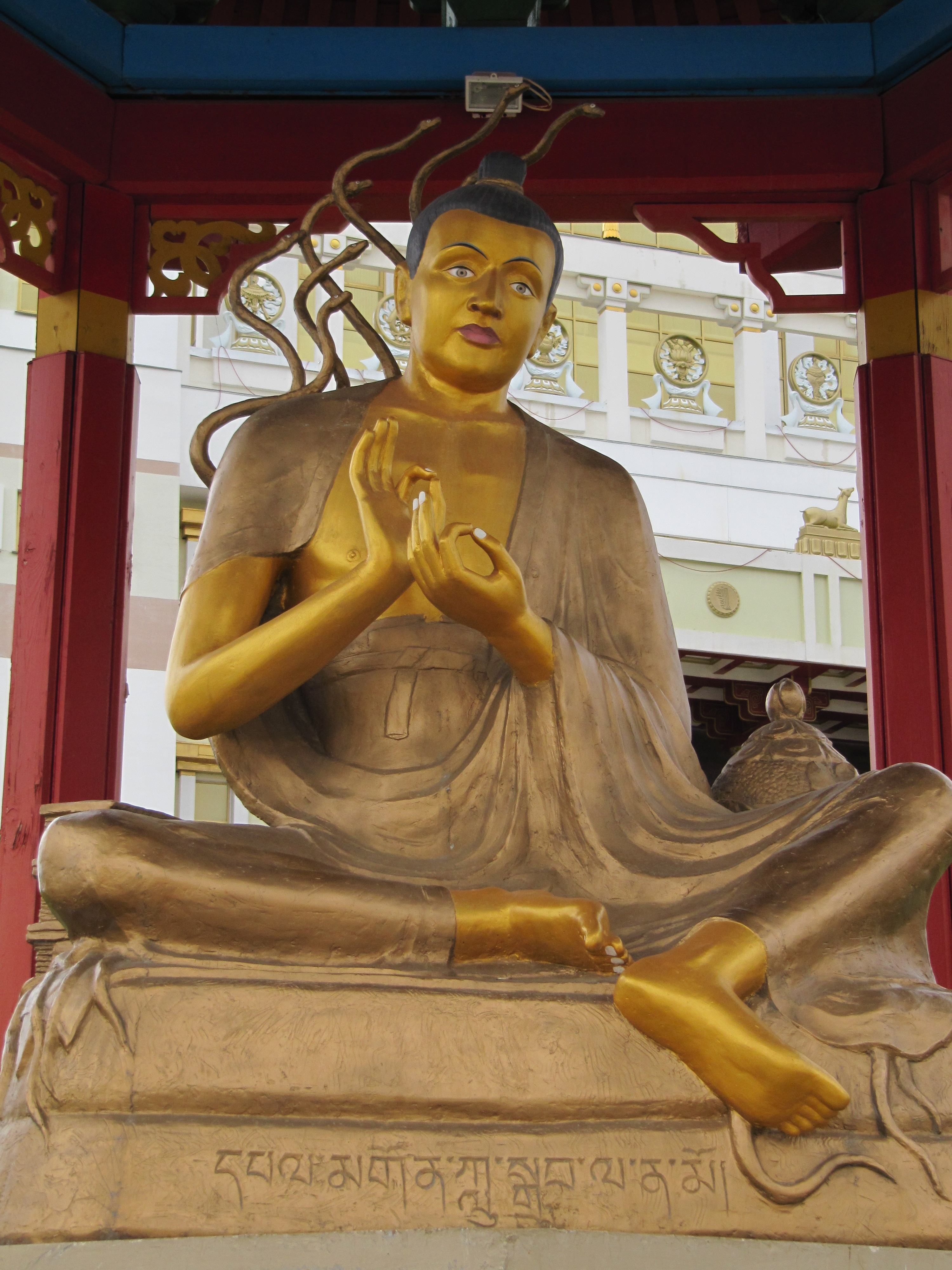 Статуя Нагарджуны, центральный хурул, Элиста, Калмыкия